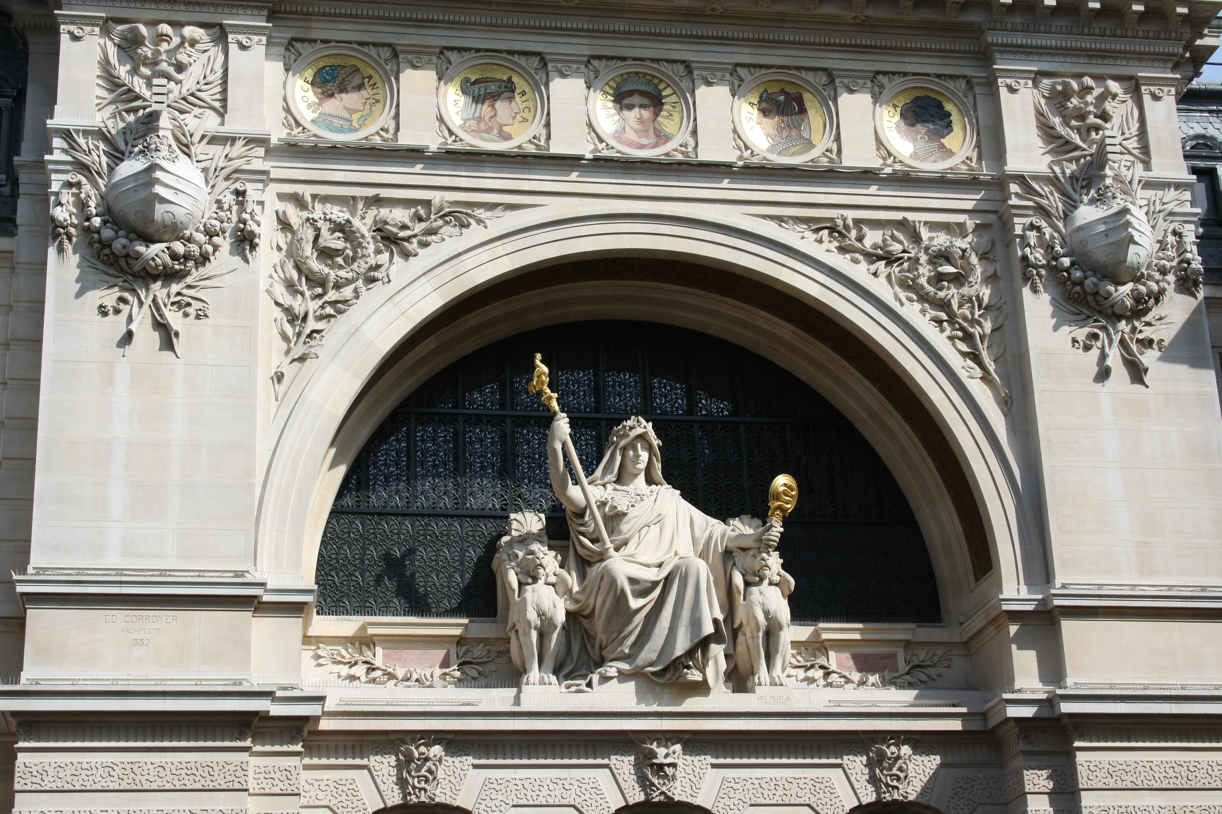 Bankgebäude der BNP Paribas in Paris, gebaut für Comptoir National d'Escompte de Paris, 14-20 rue Bergère